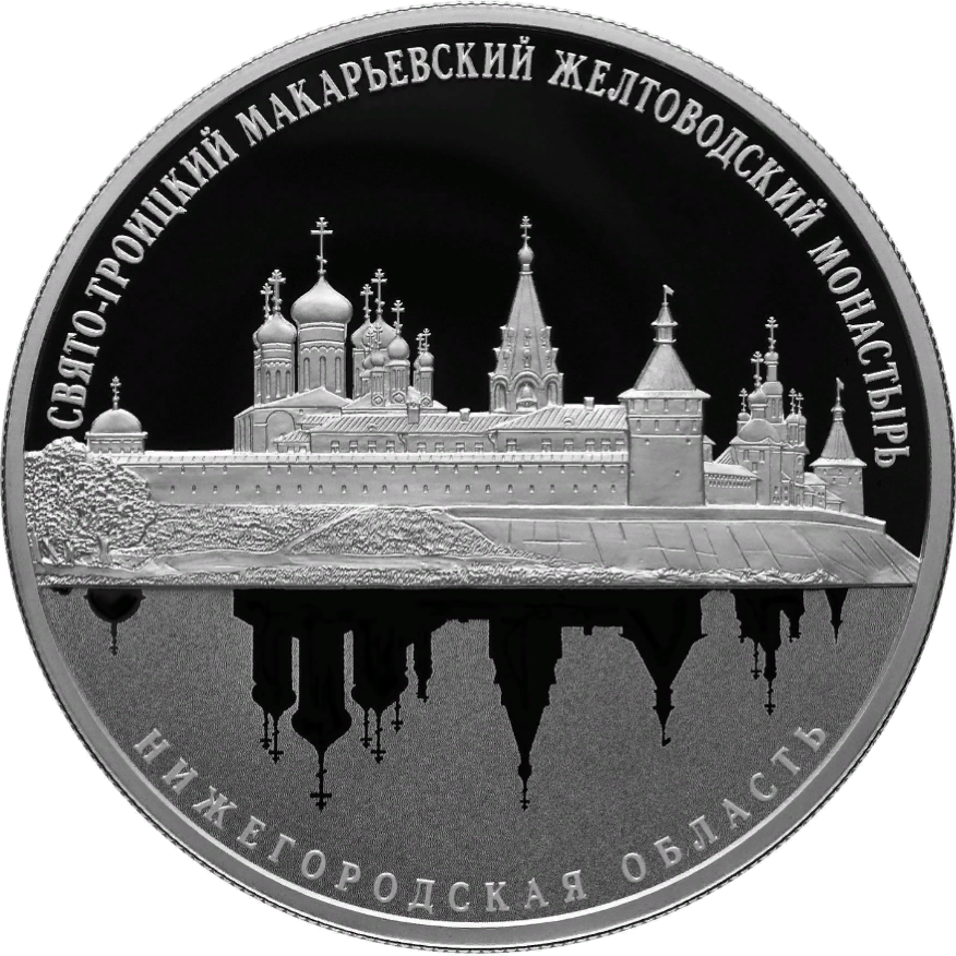 Монета Банка России. Серия: Памятники архитектуры России. Свято-Троицкий Макарьевский Желтоводский монастырь, Нижегородская обл. 25 рублей, серебро, реверс, пруф. Изображение Свято-Троицкого Макарьевского Желтоводского монастыря, в нижней части монеты — изображение реки Волги с отражающимся монастырем; вдоль канта — надписи, вверху: «СВЯТО-ТРОИЦКИЙ МАКАРЬЕВСКИЙ ЖЕЛТОВОДСКИЙ МОНАСТЫРЬ», внизу: «НИЖЕГОРОДСКАЯ ОБЛАСТЬ». Чеканка — Санкт-Петербургский монетный двор. Художник: А.В. Гнидин. Скульптор: А.В. Гнидин.